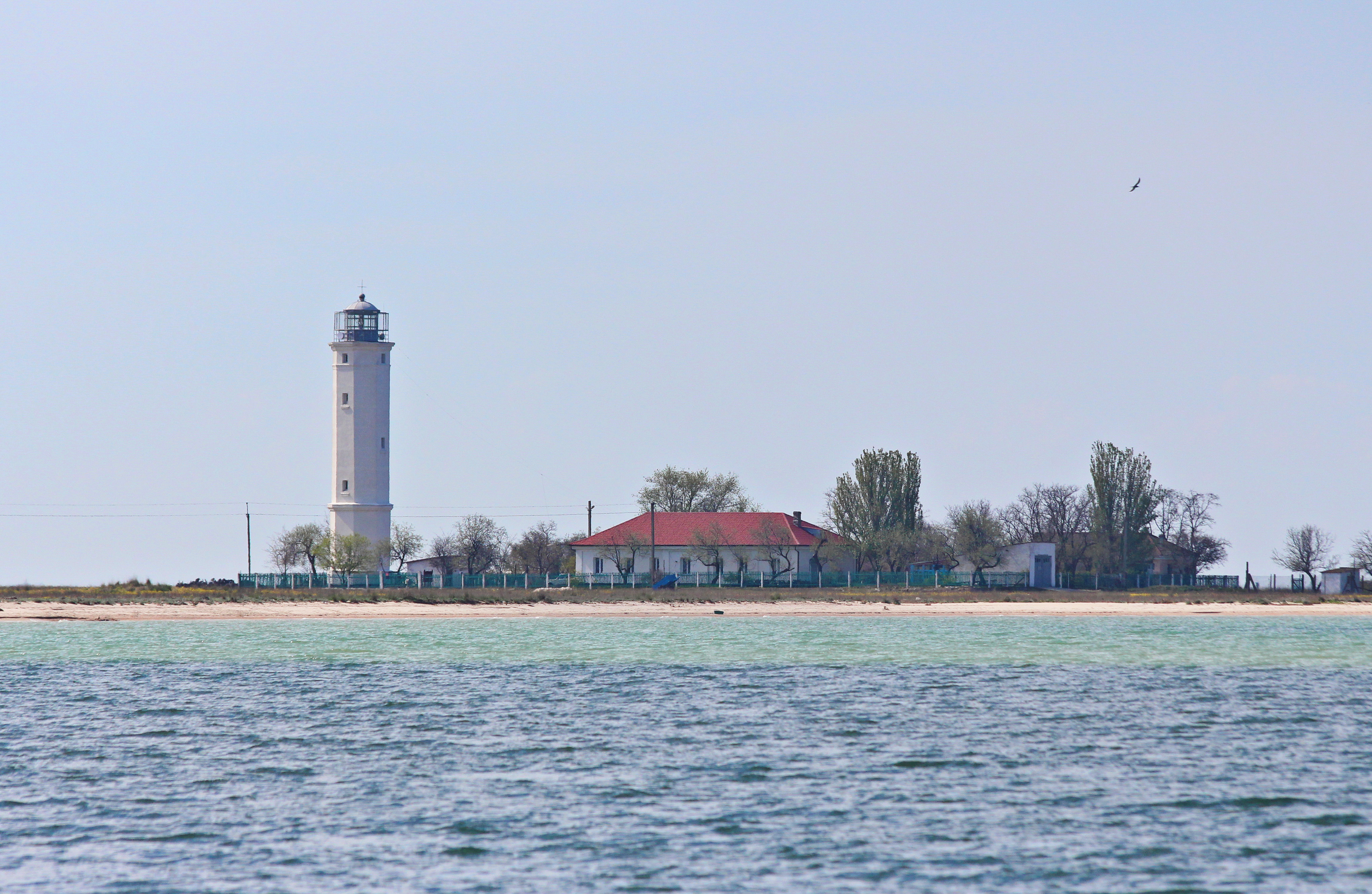 Маяк (3), Генічеський район, Бирючий острів